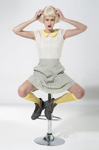 מיצג אופנה של נעמה בצלאל